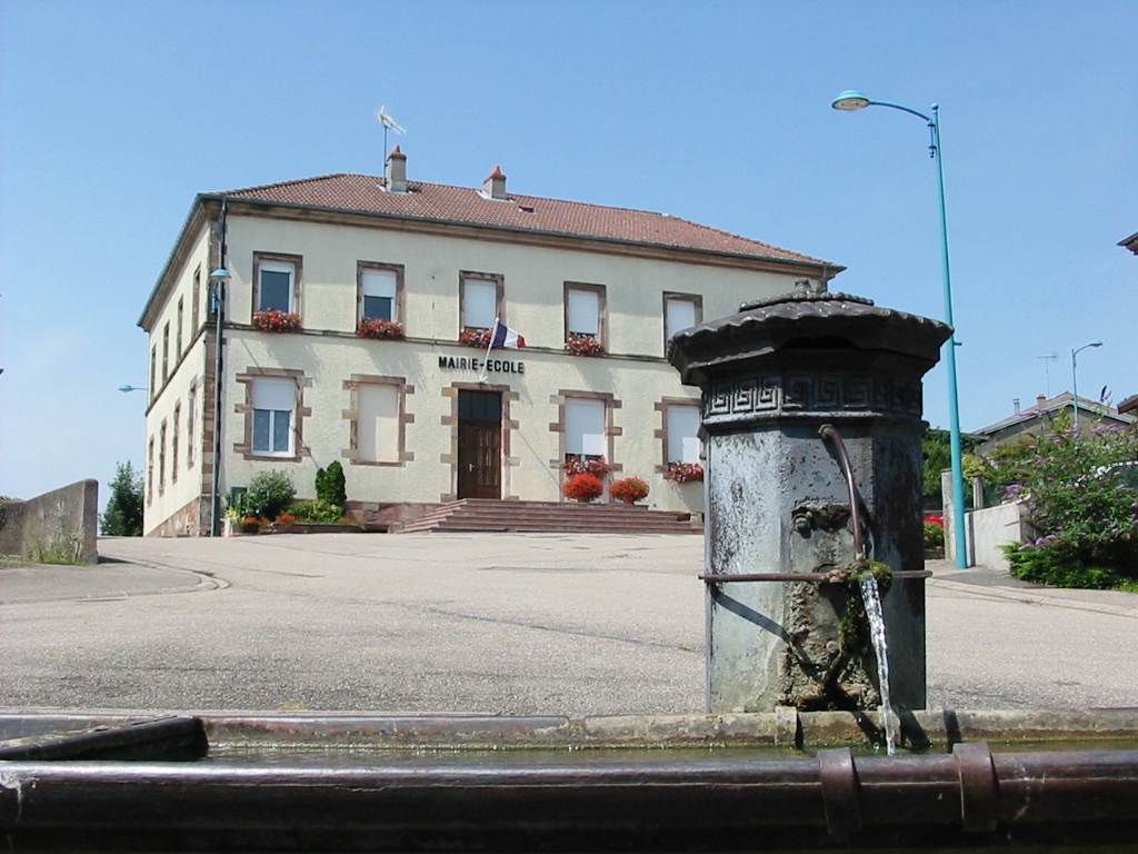 Domptail, commune des Vosges : fontaine et mairie